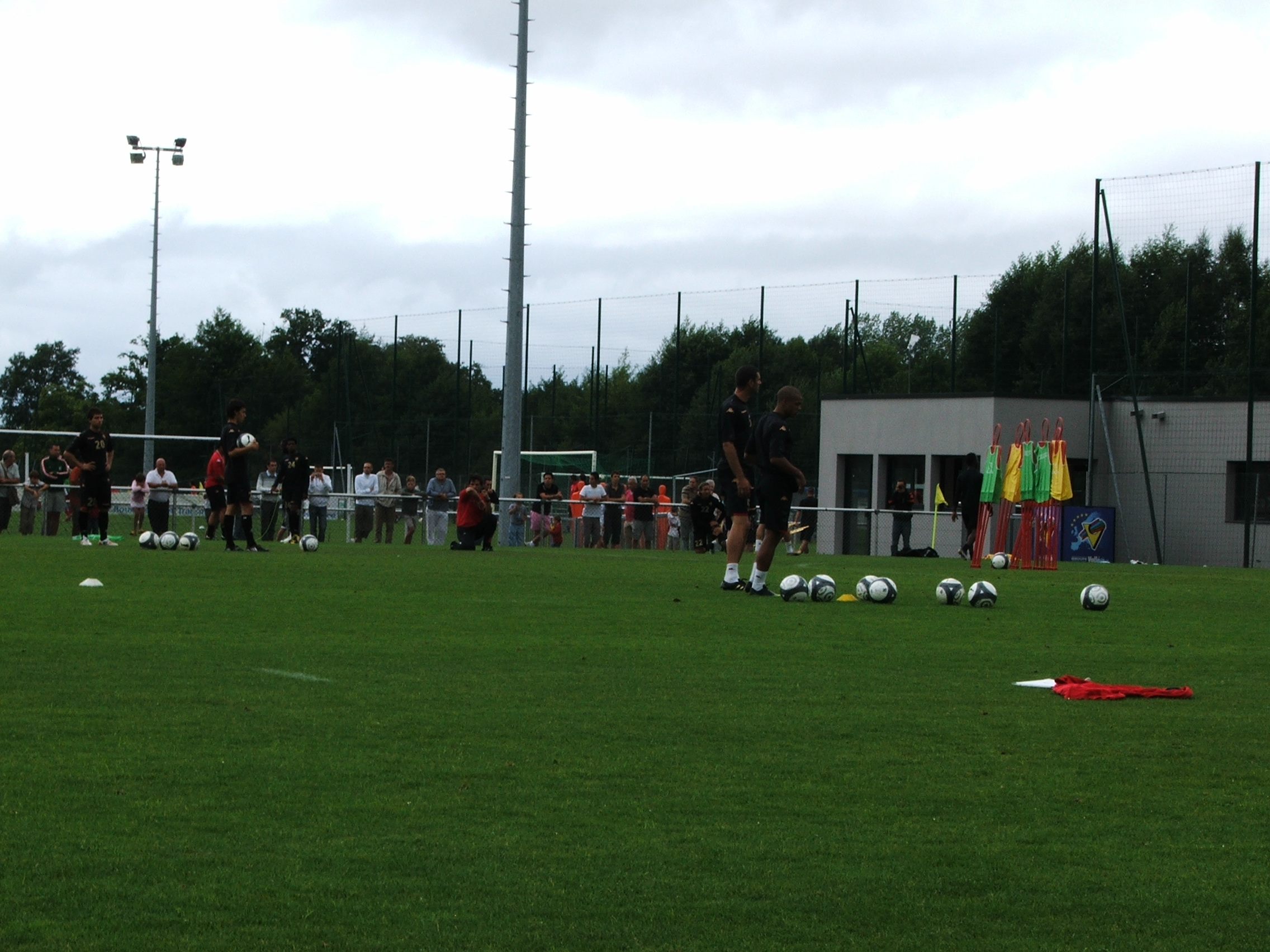 La Pincenardière, centre d'entrainement du MUC 72.